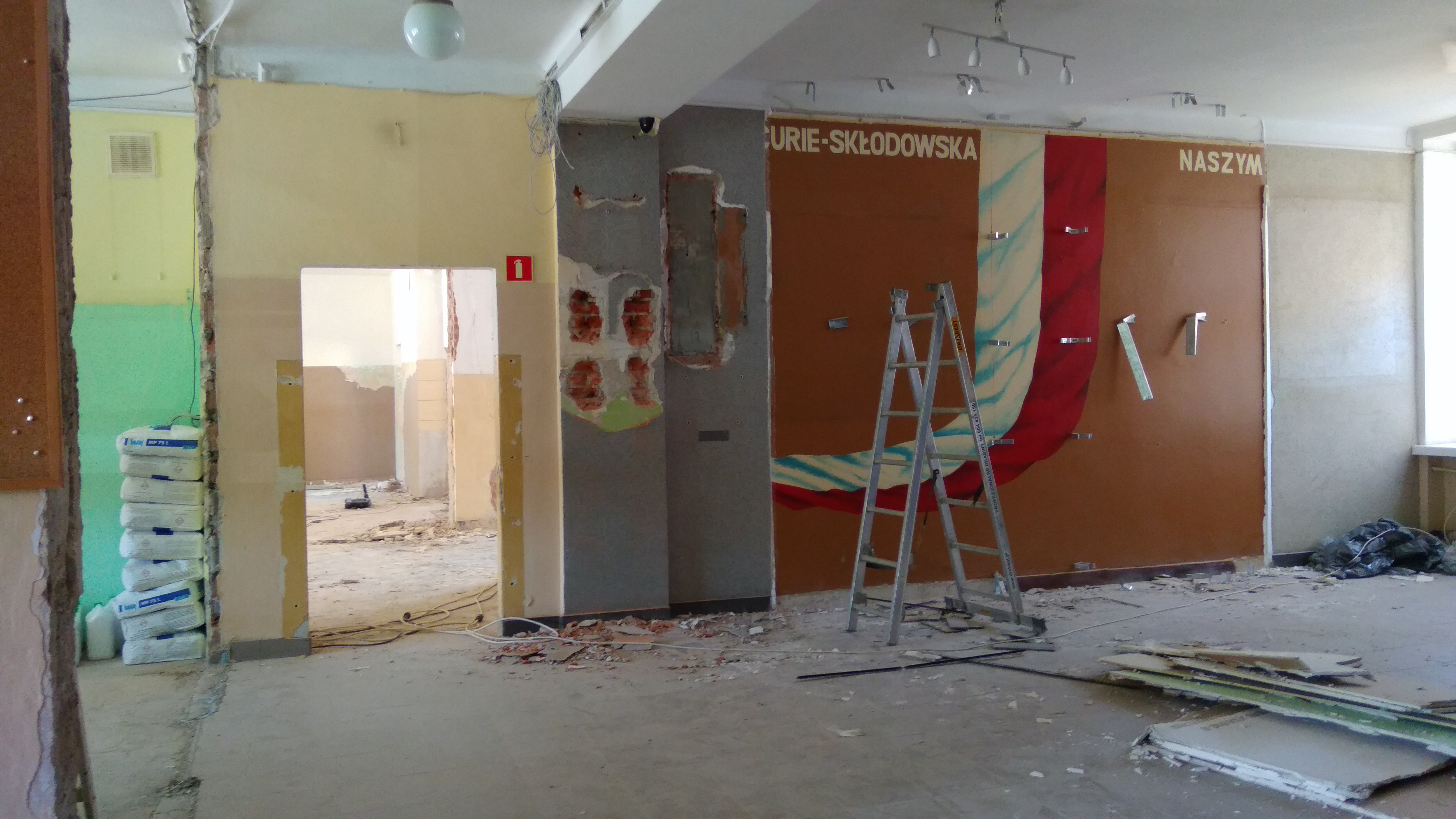 LO w Makowie Maz – część placu budowy, 3.01.2019